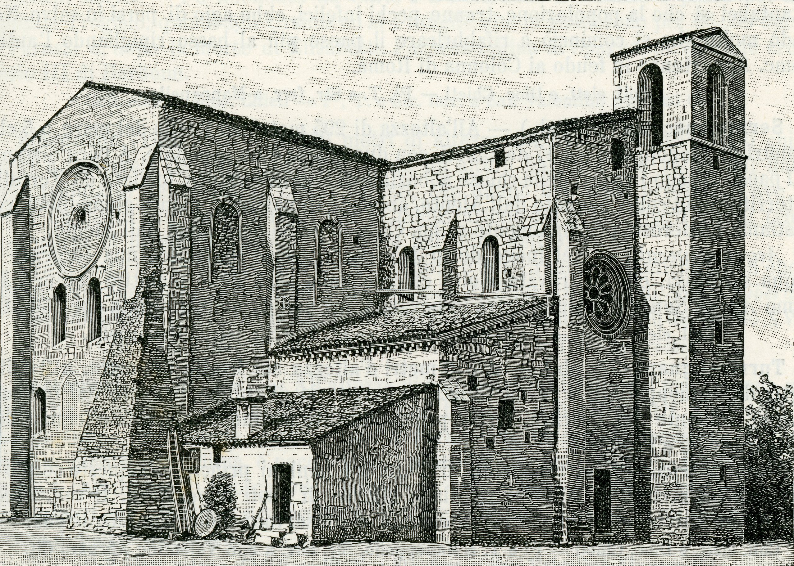 Manoppello: esterno di Santa Maria Arabona (incisore anonimo 1898).